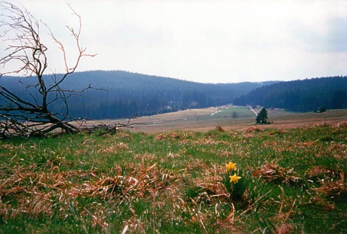 Frühling in Neuhaus